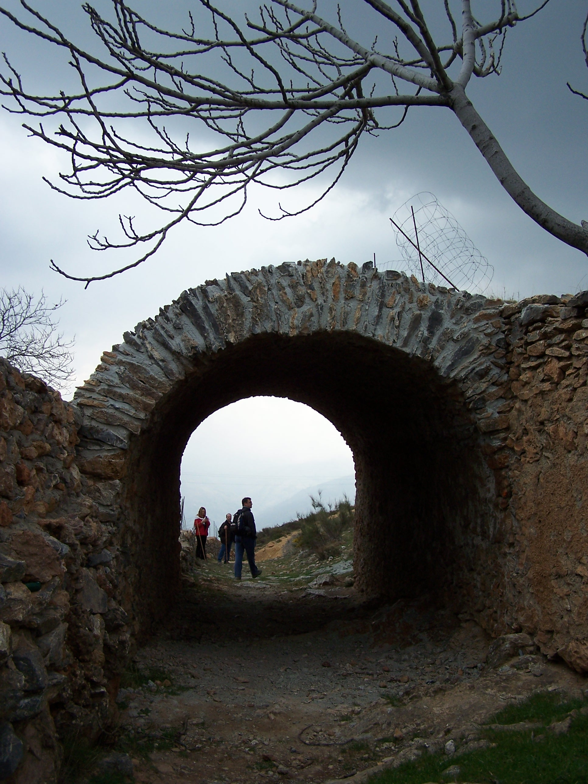 Tunel minero de la Ruta Medieval